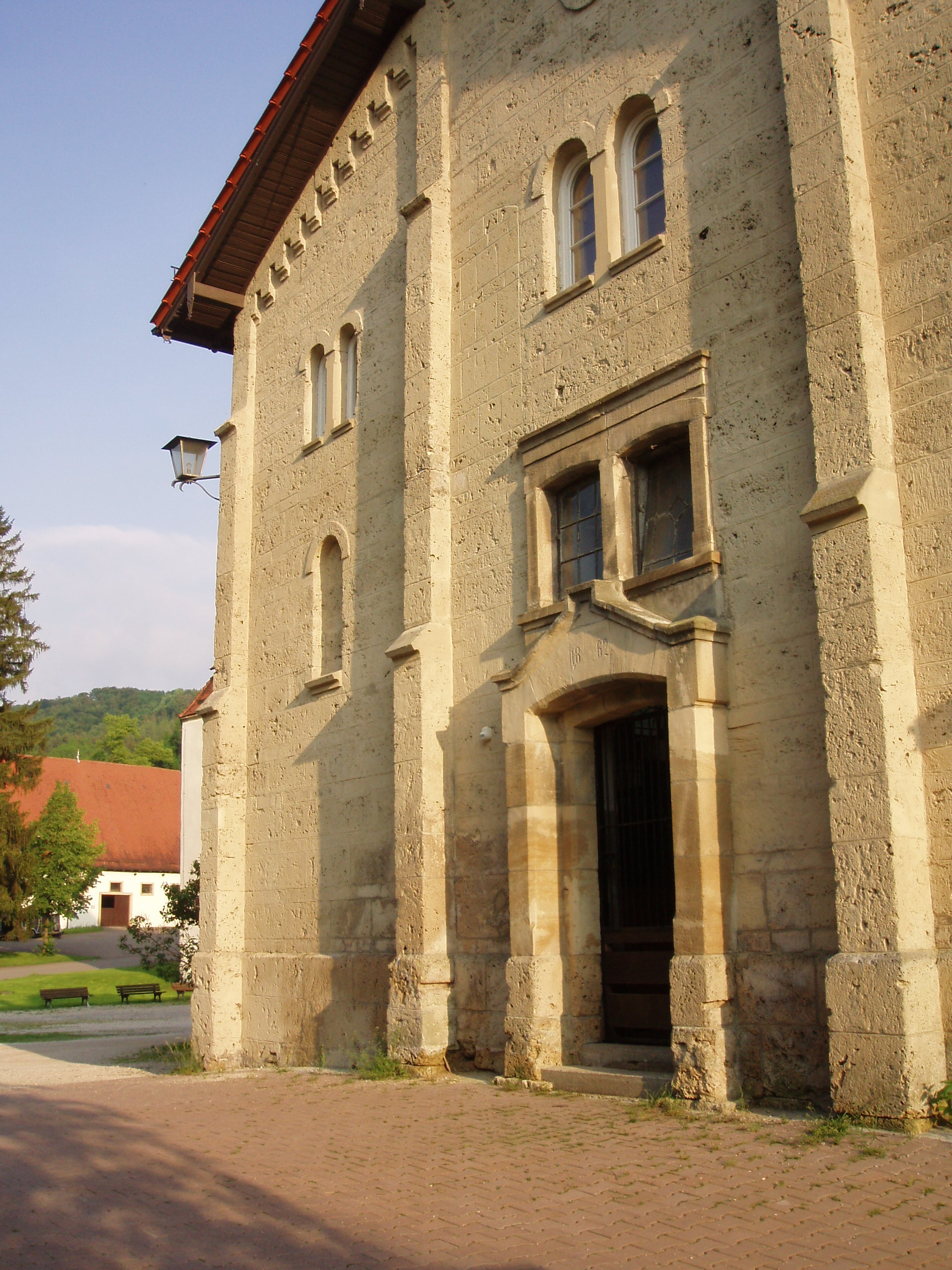 Gestüt in Offenhausen, eines der Stallgebäude